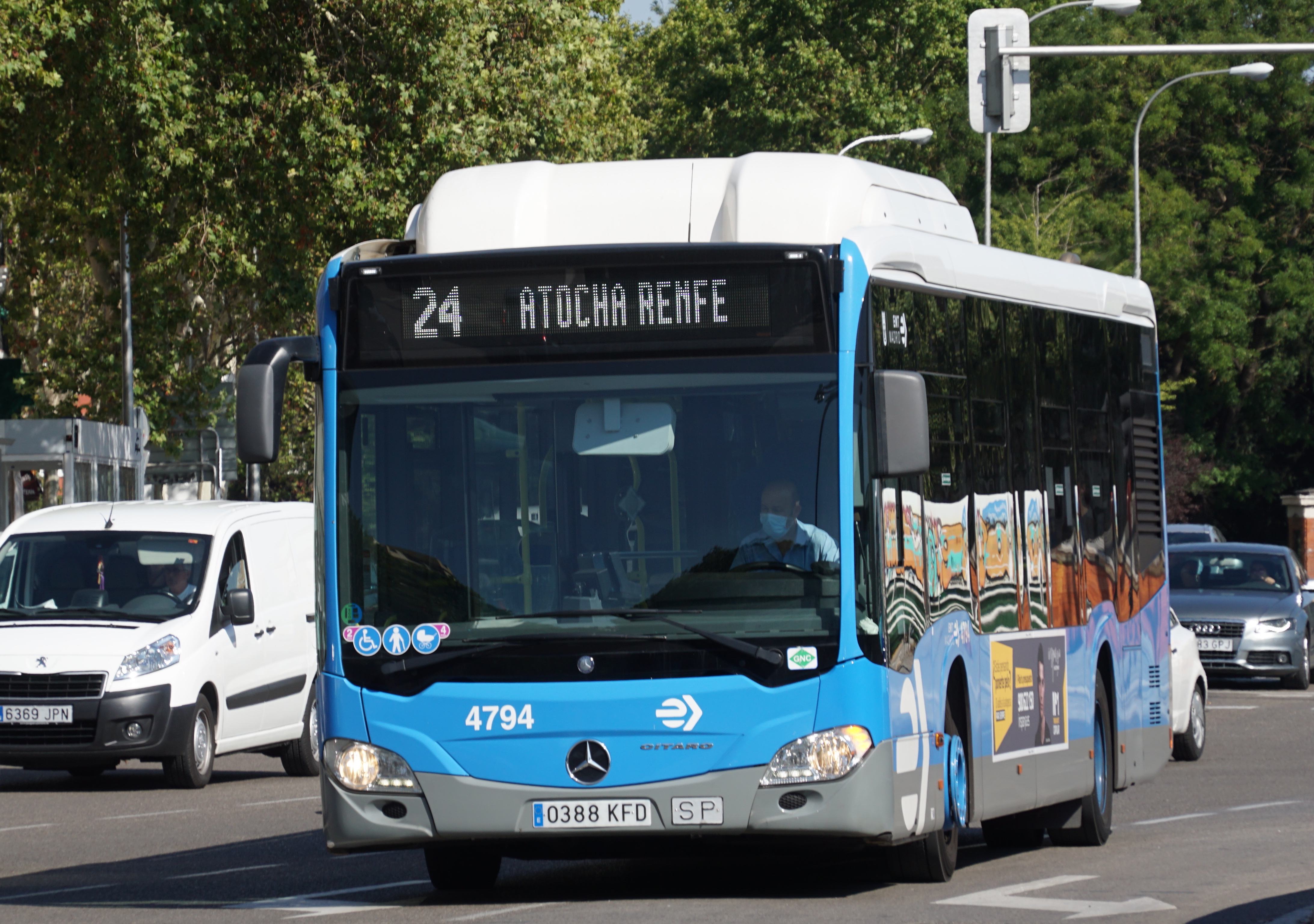 24 EMT Madrid junto a la estación de Atocha, agosto 2020